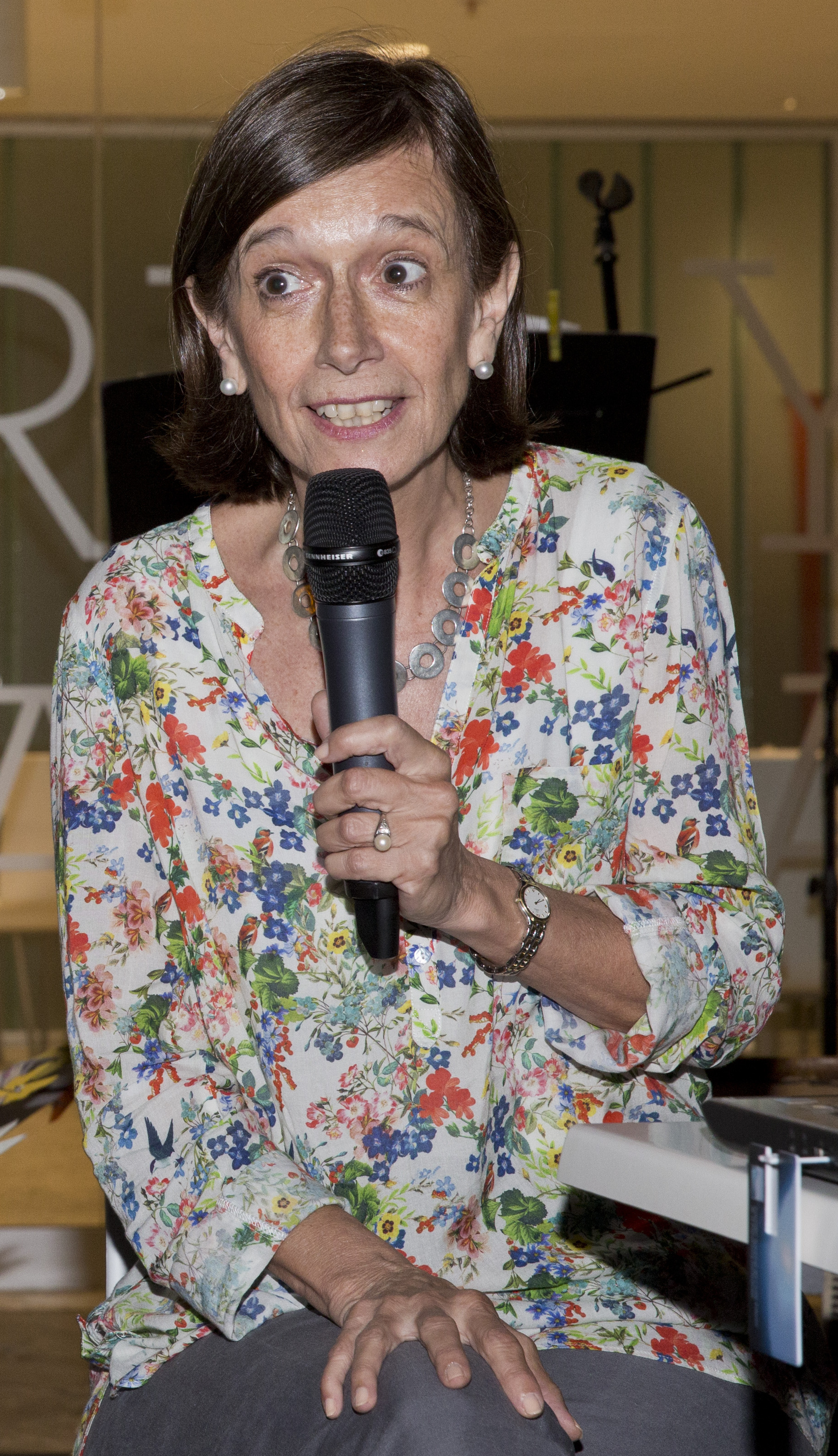 Buenos Aires, 8 de marzo de 2015.- En el marco del Día Internacional de la Mujer, el Museo Malvinas e Islas del Atlántico Sur presentó la muestra de acuarelas “Malvinas, mi casa” que reflejan la vida en Malvinas en el siglo XIX. Las obras están basadas en el “Diario de 1829 en Malvinas” de la cronista María Sáez de Vernet, escrito durante su estadía en las Islas. Además, Marcelo Vernet, descendiente de María Sáez de Vernet, y María Fernanda Cañás, quien fue maestra en Malvinas, brindó una charla sobre las mujeres que cumplieron un rol destacado en la historia de las Islas. Para culminar la velada, se realizó un show musical a cargo del poeta, músico y ex combatiente Martín Raninqueo, quien se presentó junto a Diego Rolón en guitarra y Potolo Abrego en percusión. Foto: Augusto Starita / Ministerio de Cultura de la Nación. Buenos Aires, 8 de marzo de 2015.- En el marco del Día Internacional de la Mujer, el Museo Malvinas e Islas del Atlántico Sur presentó la muestra de acuarelas “Malvinas, mi casa” que reflejan la vida en Malvinas en el siglo XIX. Las obras están basadas en el “Diario de 1829 en Malvinas” de la cronista María Sáez de Vernet, escrito durante su estadía en las Islas. Además, Marcelo Vernet, descendiente de María Sáez de Vernet, y María Fernanda Cañás, quien fue maestra en Malvinas, brindó una charla sobre las mujeres que cumplieron un rol destacado en la historia de las Islas. Para culminar la velada, se realizó un show musical a cargo del poeta, músico y ex combatiente Martín Raninqueo, quien se presentó junto a Diego Rolón en guitarra y Potolo Abrego en percusión.